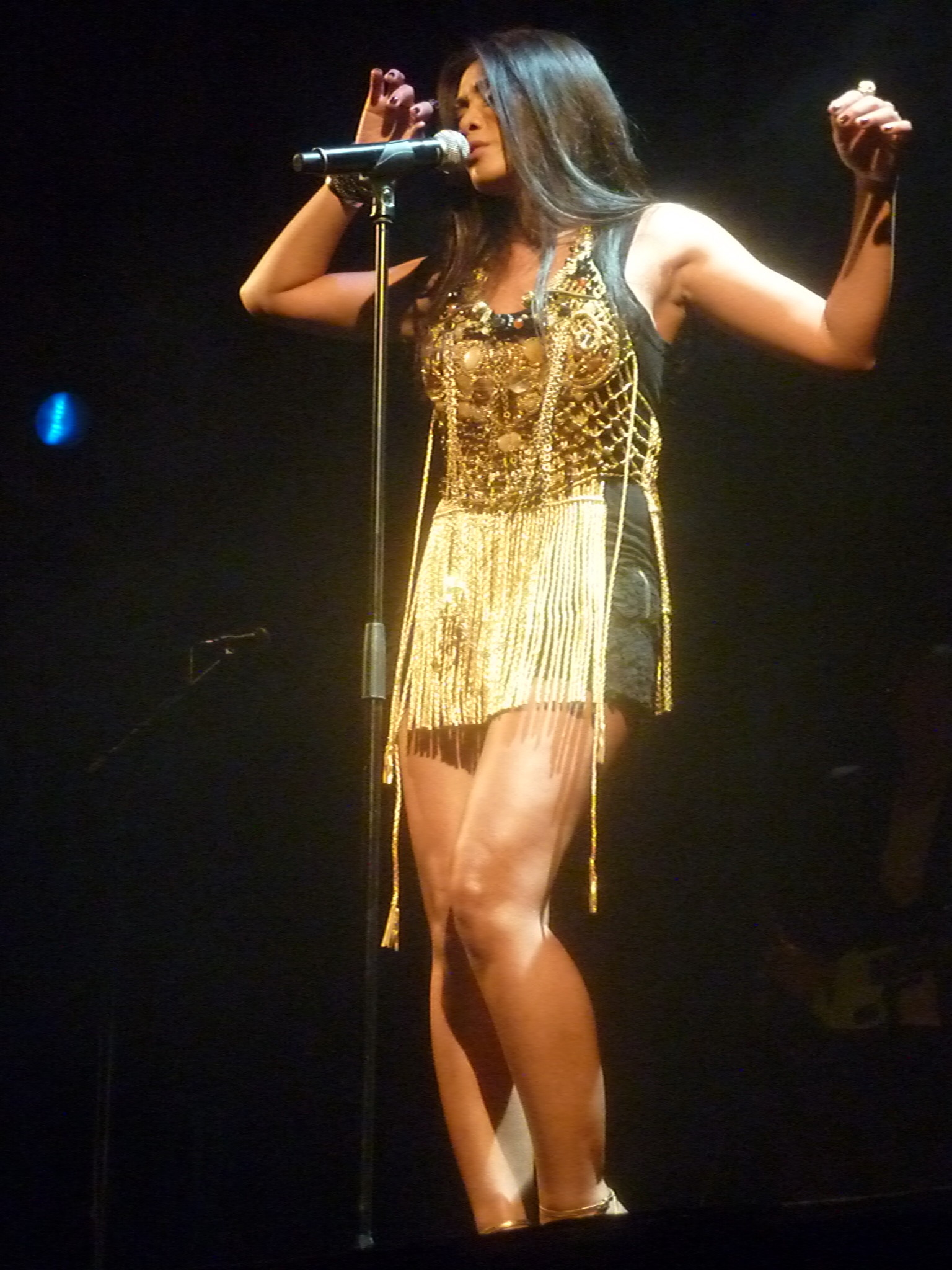 La chanteuse Anggun en concert au Trianon à paris en juin 2012